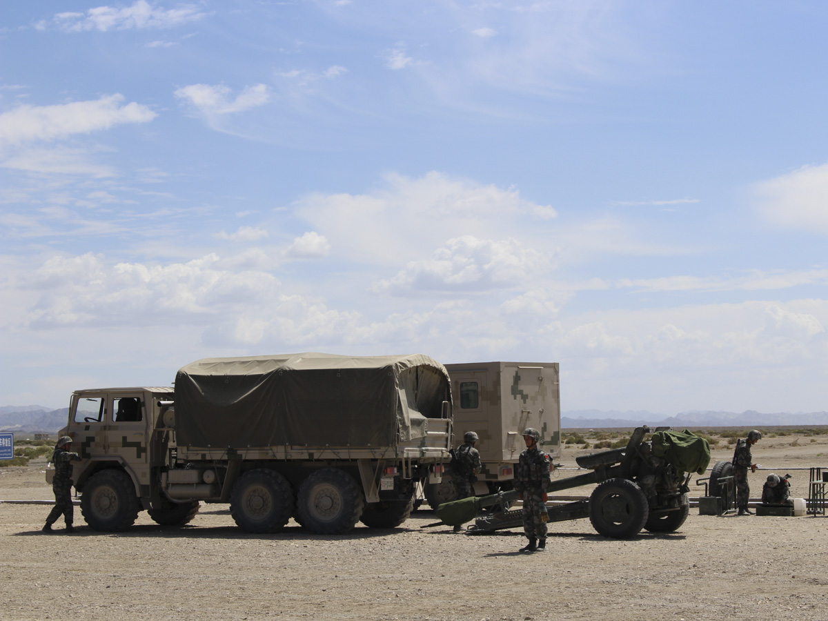 Прибытие команд стран-участниц международных этапов «АрМИ-2017» в КНР (полигон Корла)